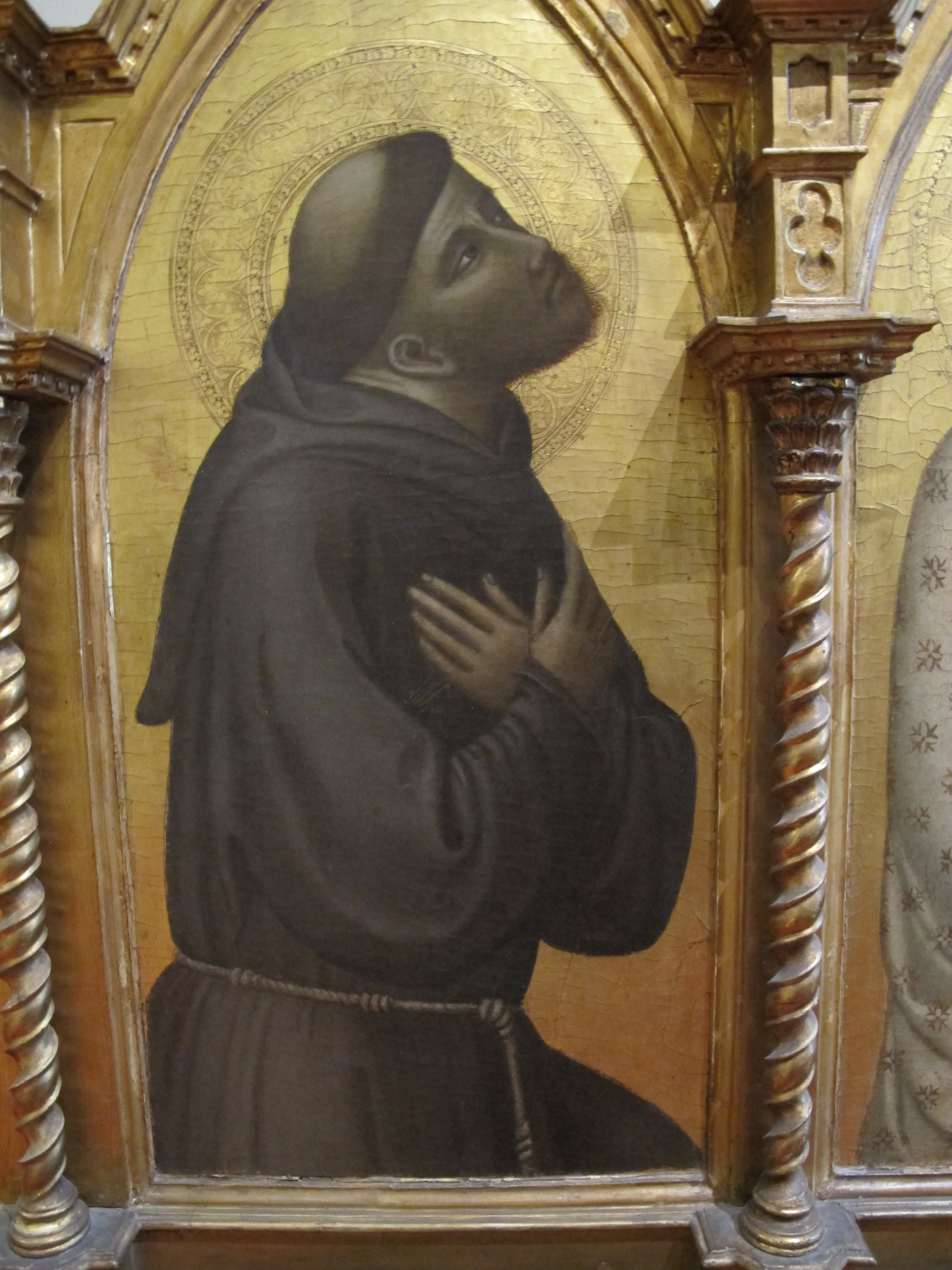 Bernardo daddi, madonna col bambino e santi, 1325-35 ca. da spedale misericordia 3